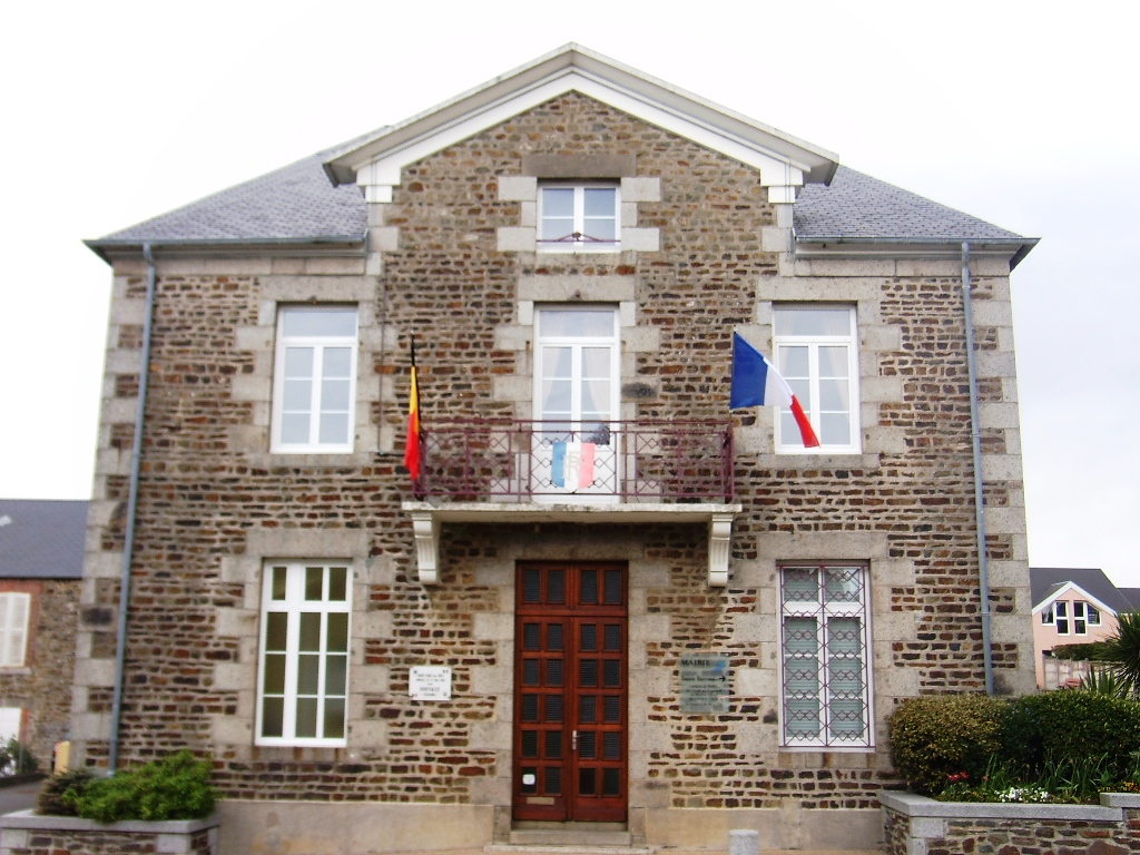 Hôtel de Ville de Saint-pair-sur-Mer (50)